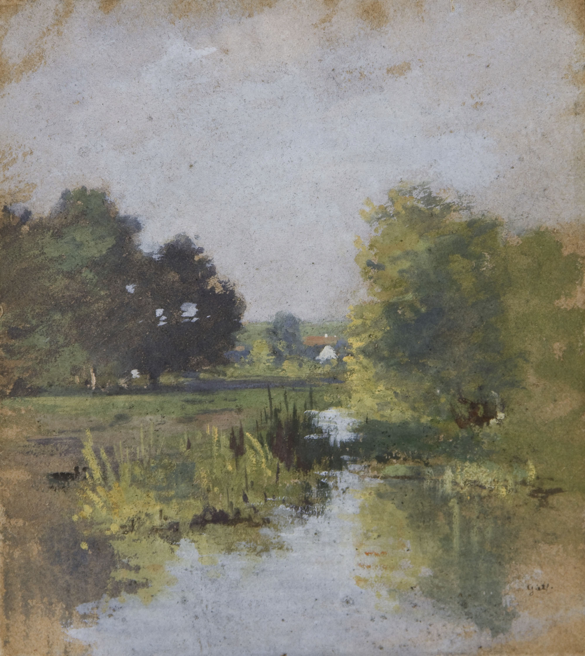 Darstellung einer baumbewaldeten Landschaft mit Flusslauf, Öl auf Malpappe, 19,5 x 17 cm